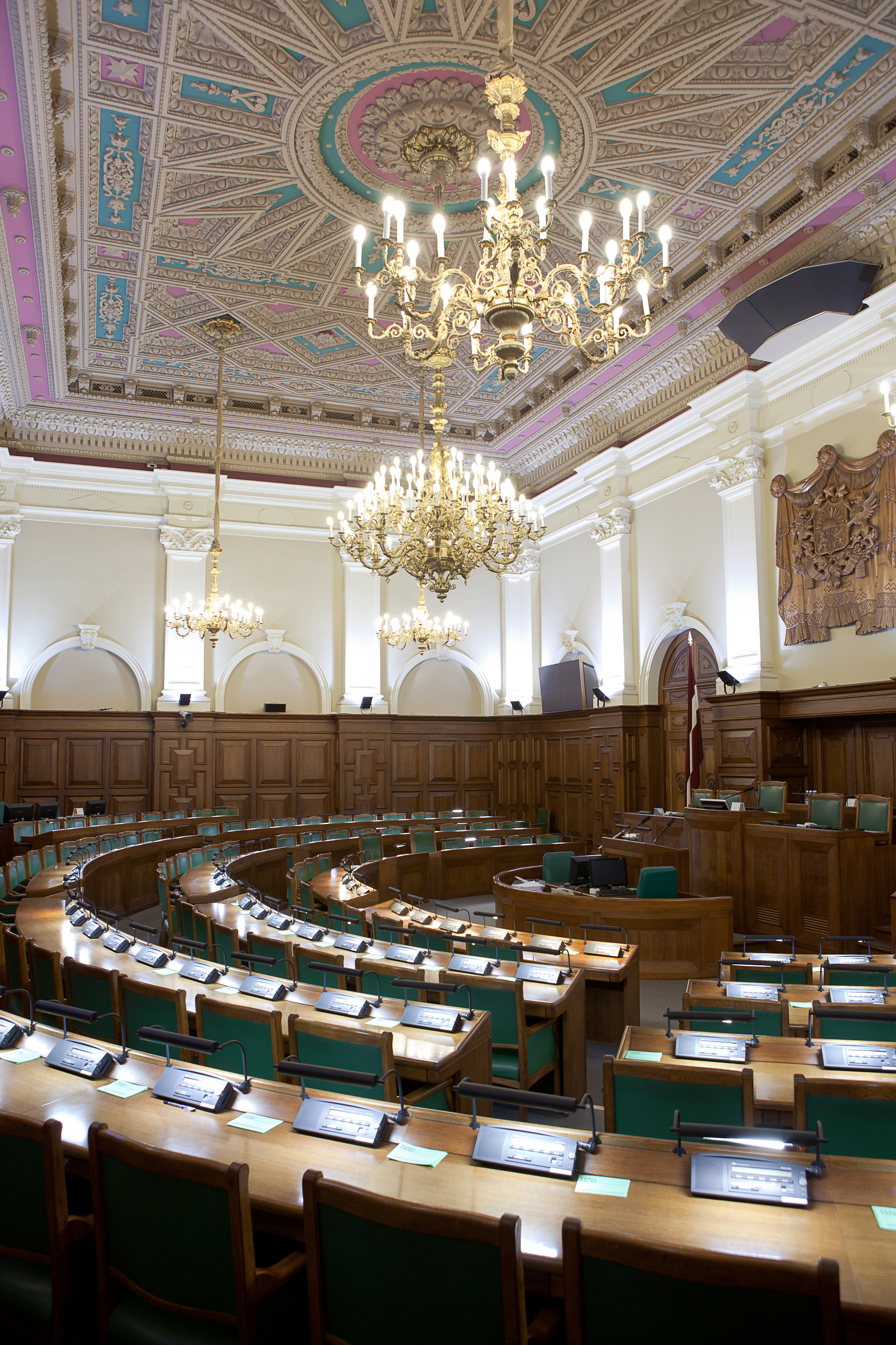 Foto: Saeima